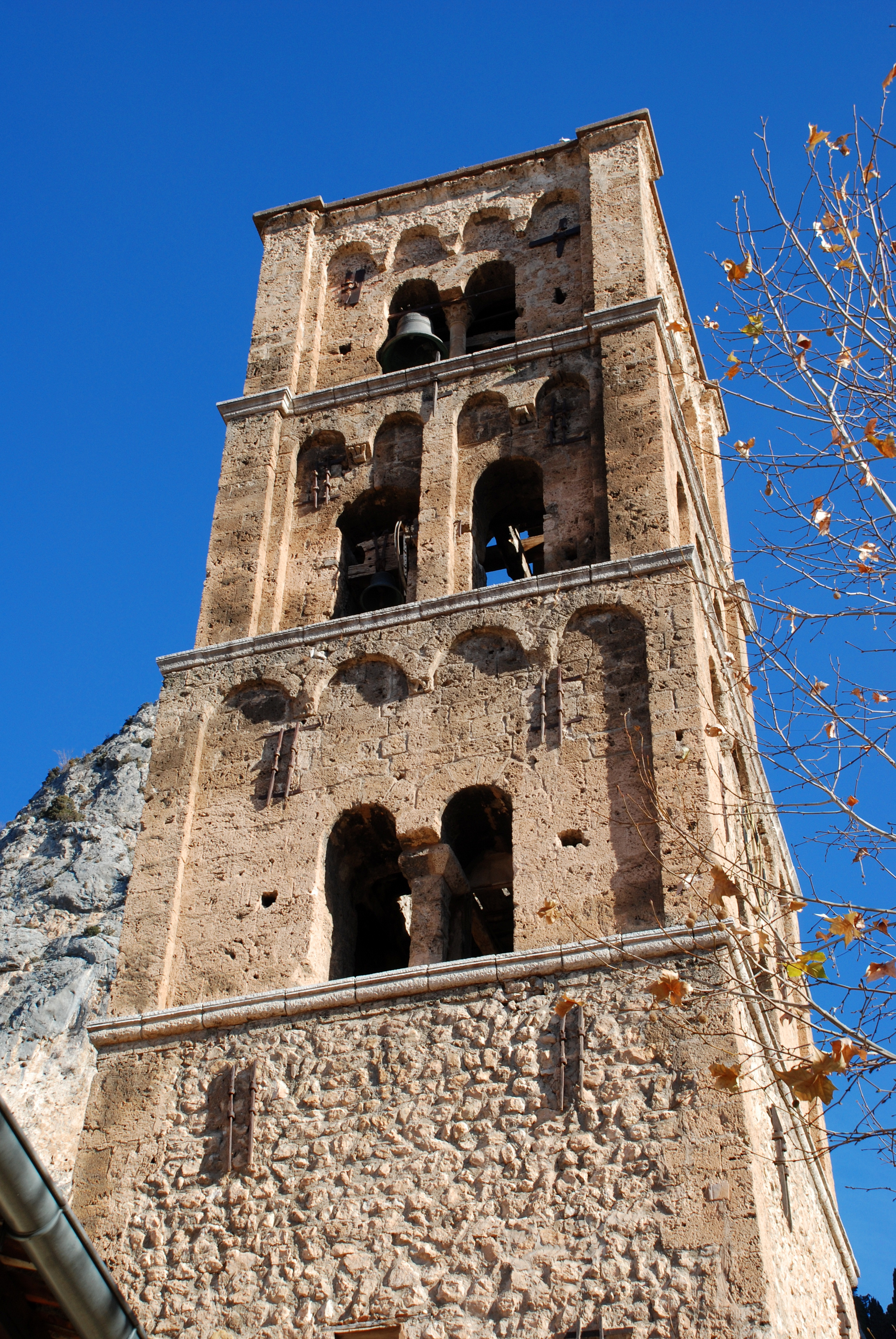 Moustiers-Sainte-Marie - église Notre-Dame